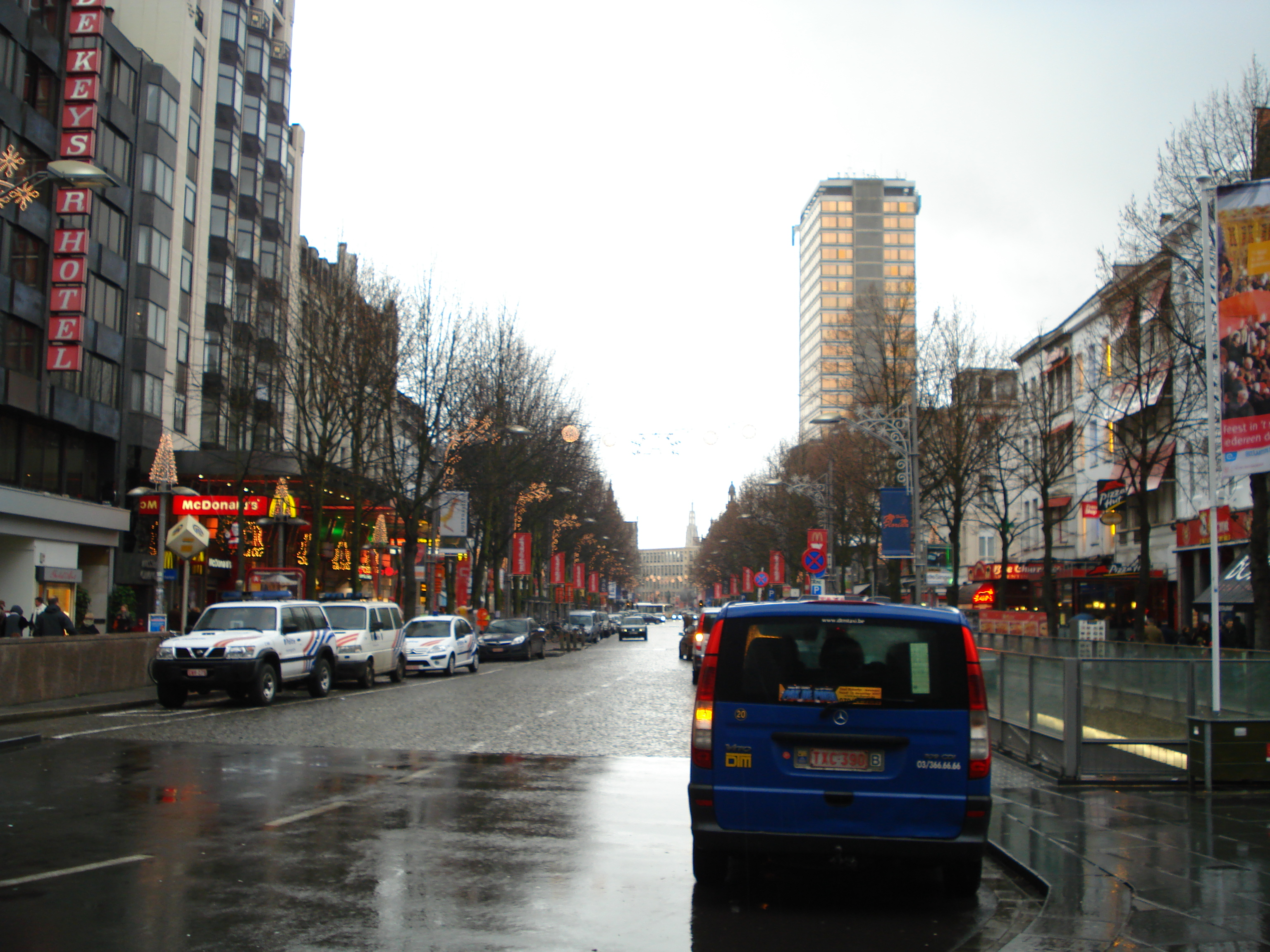 The De Keyserlei straat in Antwerp, Belgium